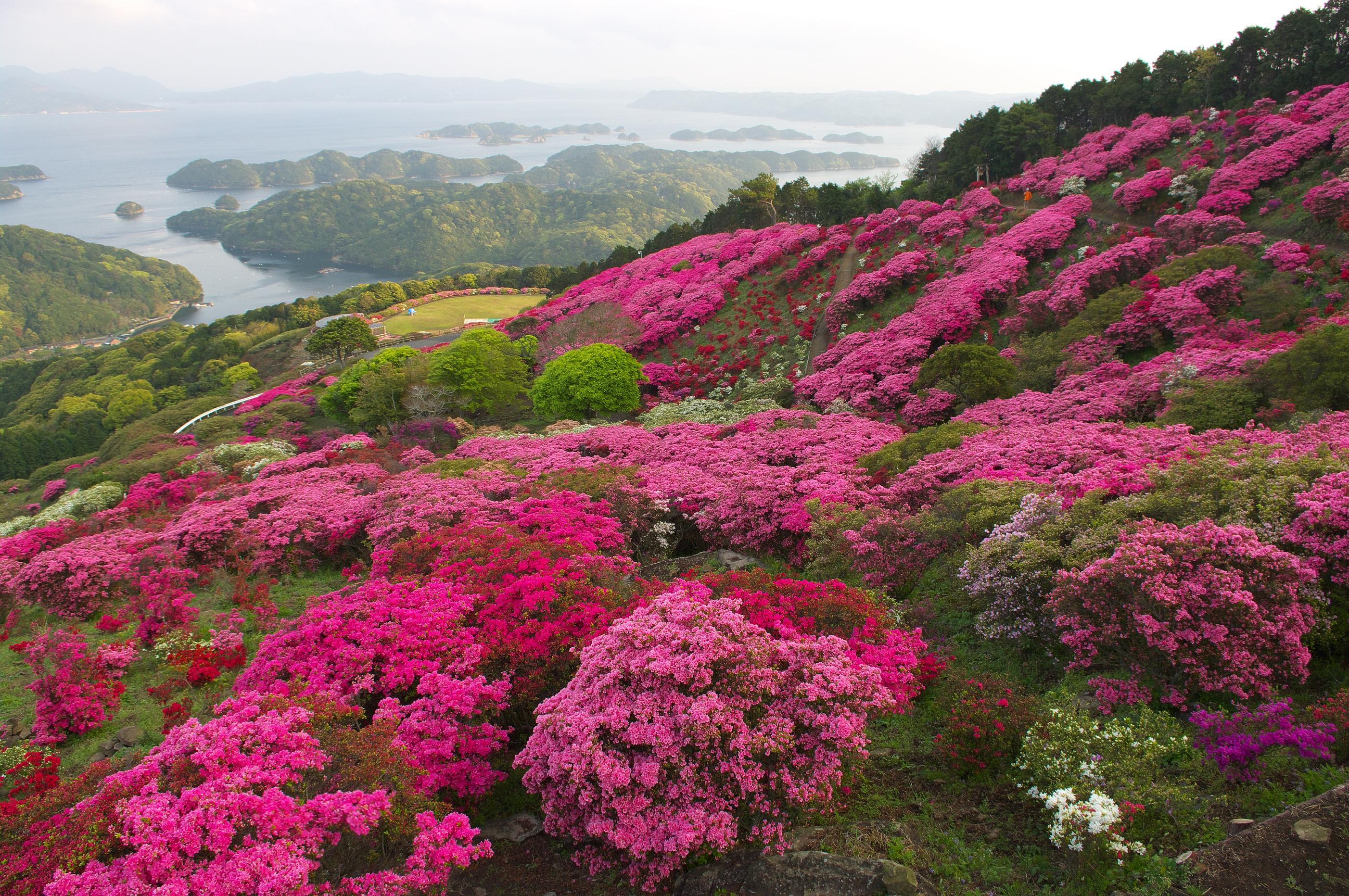 長串山公園